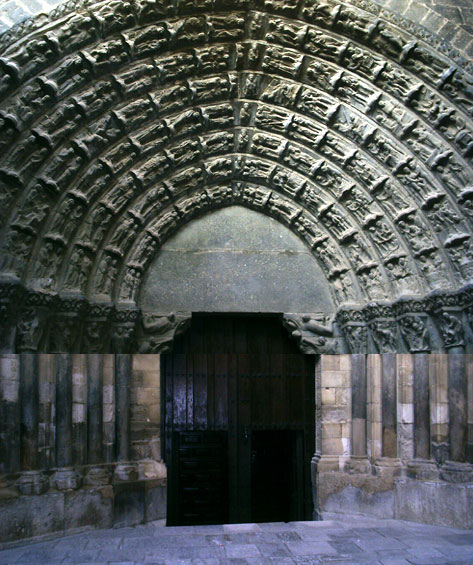 Puerta llamada "La del Juicio" o "La Pintada" autor user:papix